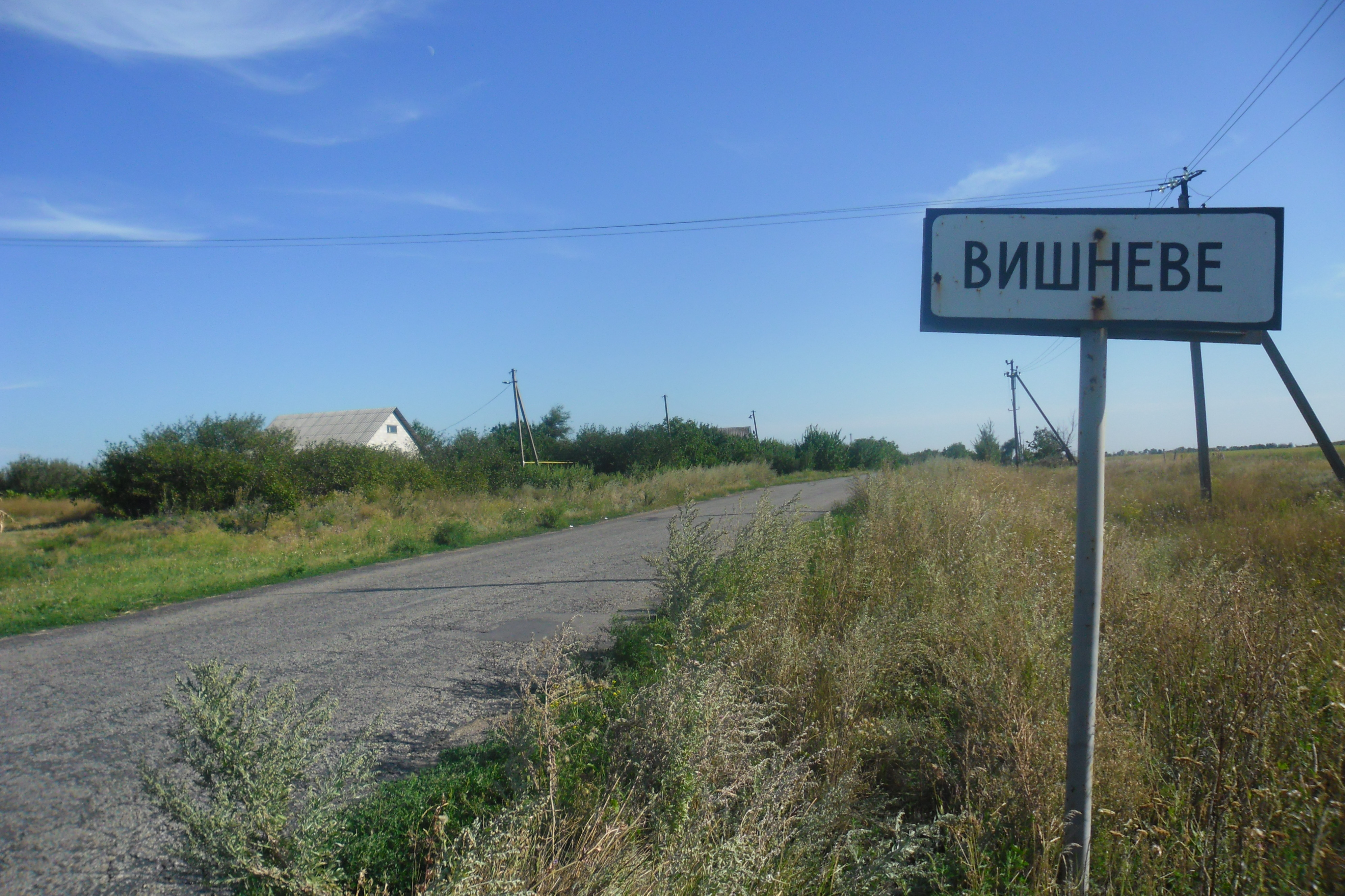 Фото